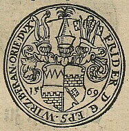 Ausschnitt aus dem Blatt: Münzrückseite mit dem fürstbischöflichen Wappen des Würzburger Bischofs Friedrich von Wirsberg